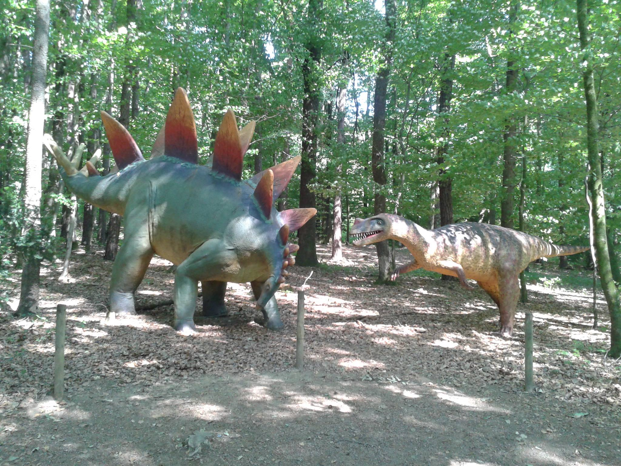 Kampfszenen wurden nachgestellt